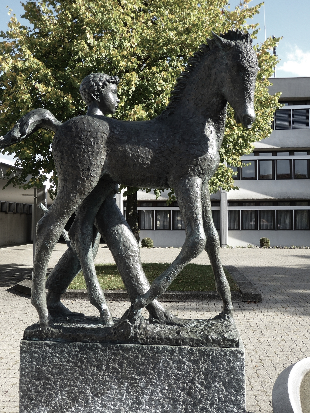 Brunnen Skulptur, 1960, von Walter Hürlimann (1934-2005) für Albert Meyer (1870-1953) Politiker. Standort, Gemeindeplatz von Fällanden, Zürich